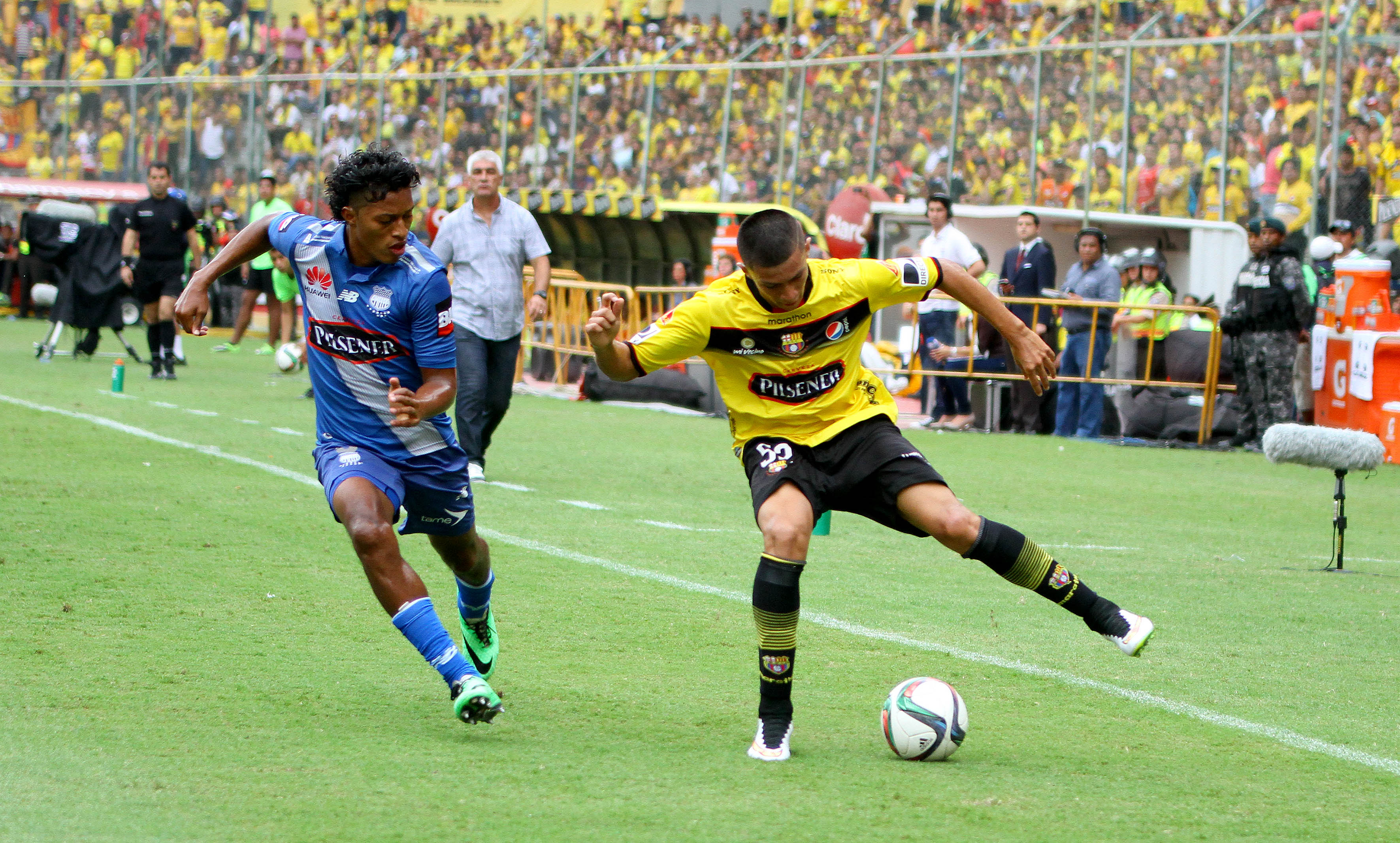 Guayaquil 10 de may (Andes).-Barcelona enfrenta a Emelec en el tradicional Clásico del Astillero en la fecha 17 del campeonato ecuatoriano de fútbol Foto:César Muñoz/Andes